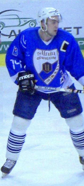 Jerzy Gabryś (Unia Oświęcim) w meczu KH Sanok - Unia Oświęcim (6:2) 14 stycznia 2007.